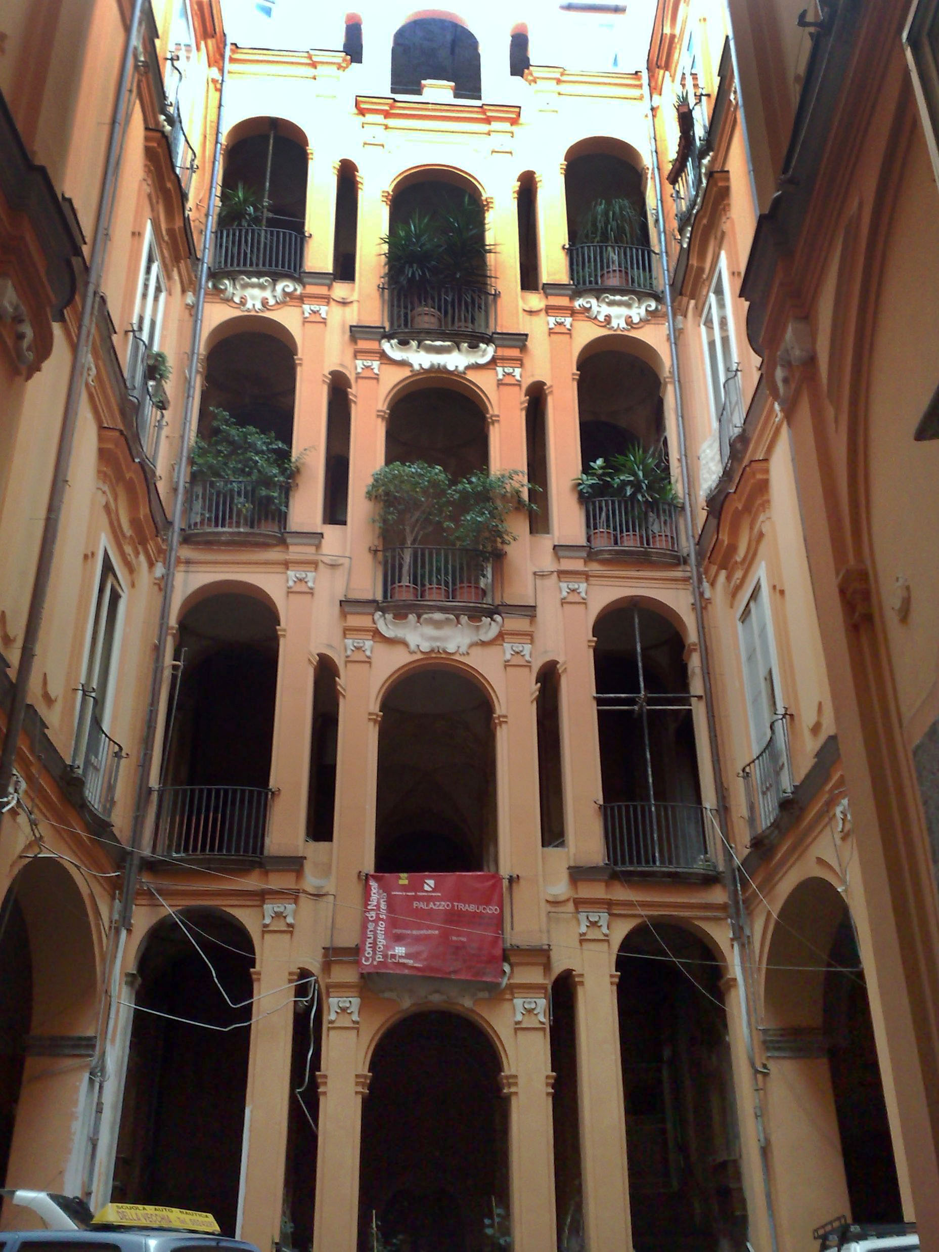 Palazzo Trabucco (Napoli) - Scalone monumentale sul cortile interno